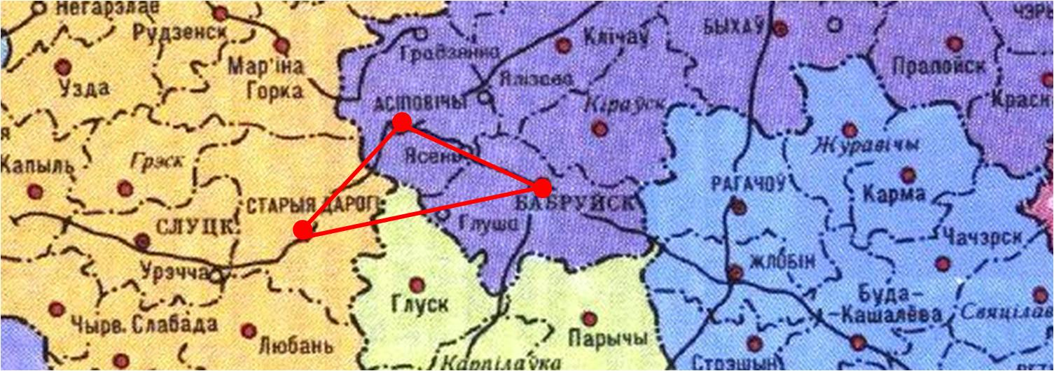 Район боевой деятельности 161-ой партизанской бригады им. Котовского